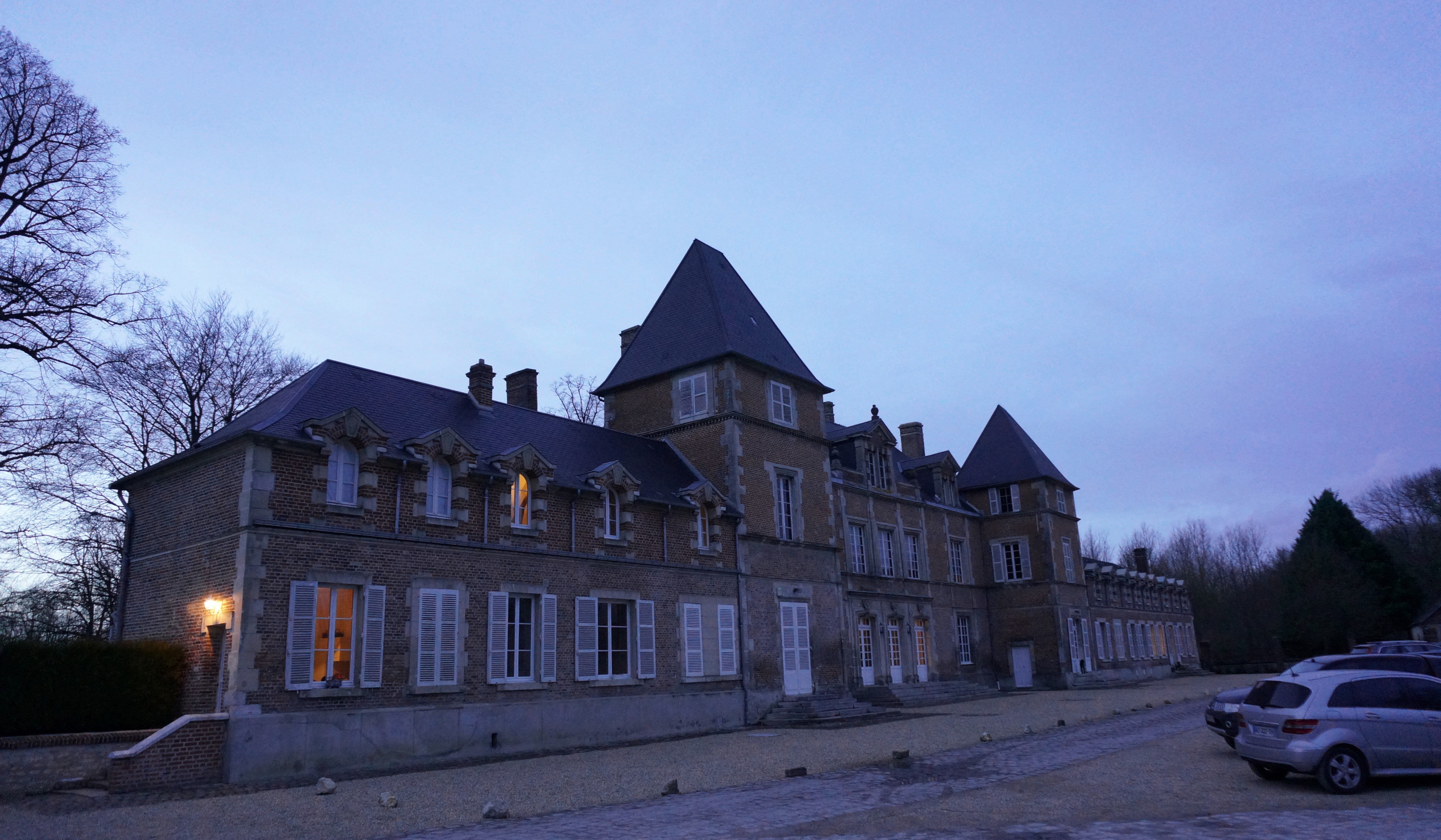 Vue du village. La château.